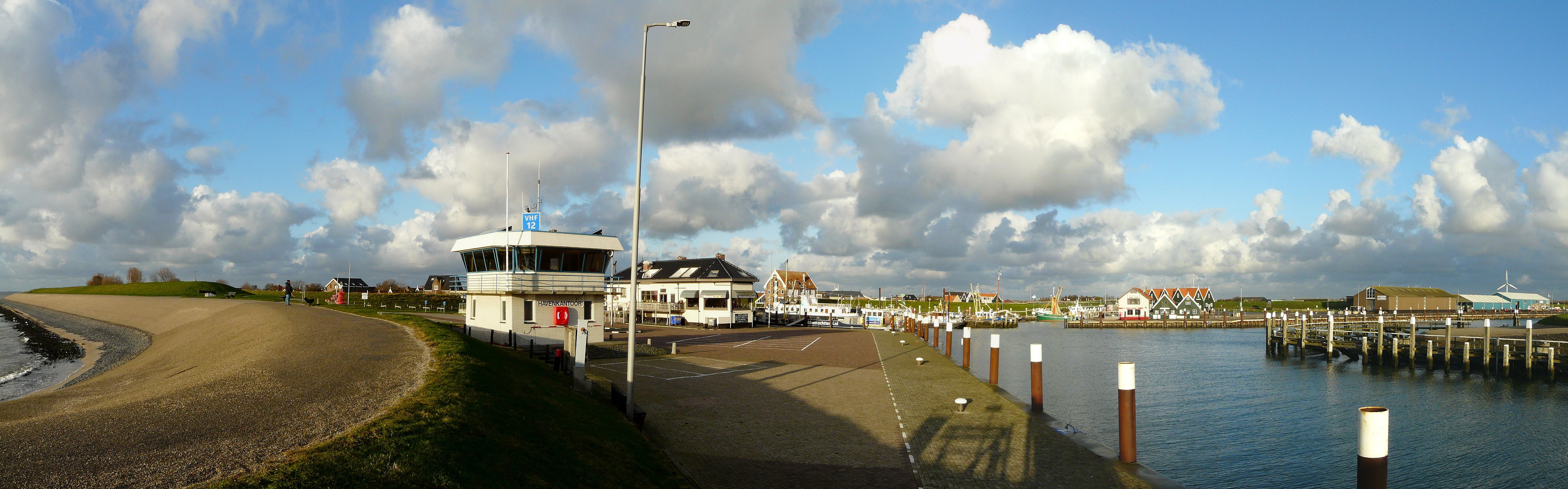 Panorama der Hafeneinfahrt von Oudeschild (Texel, Niederlande)